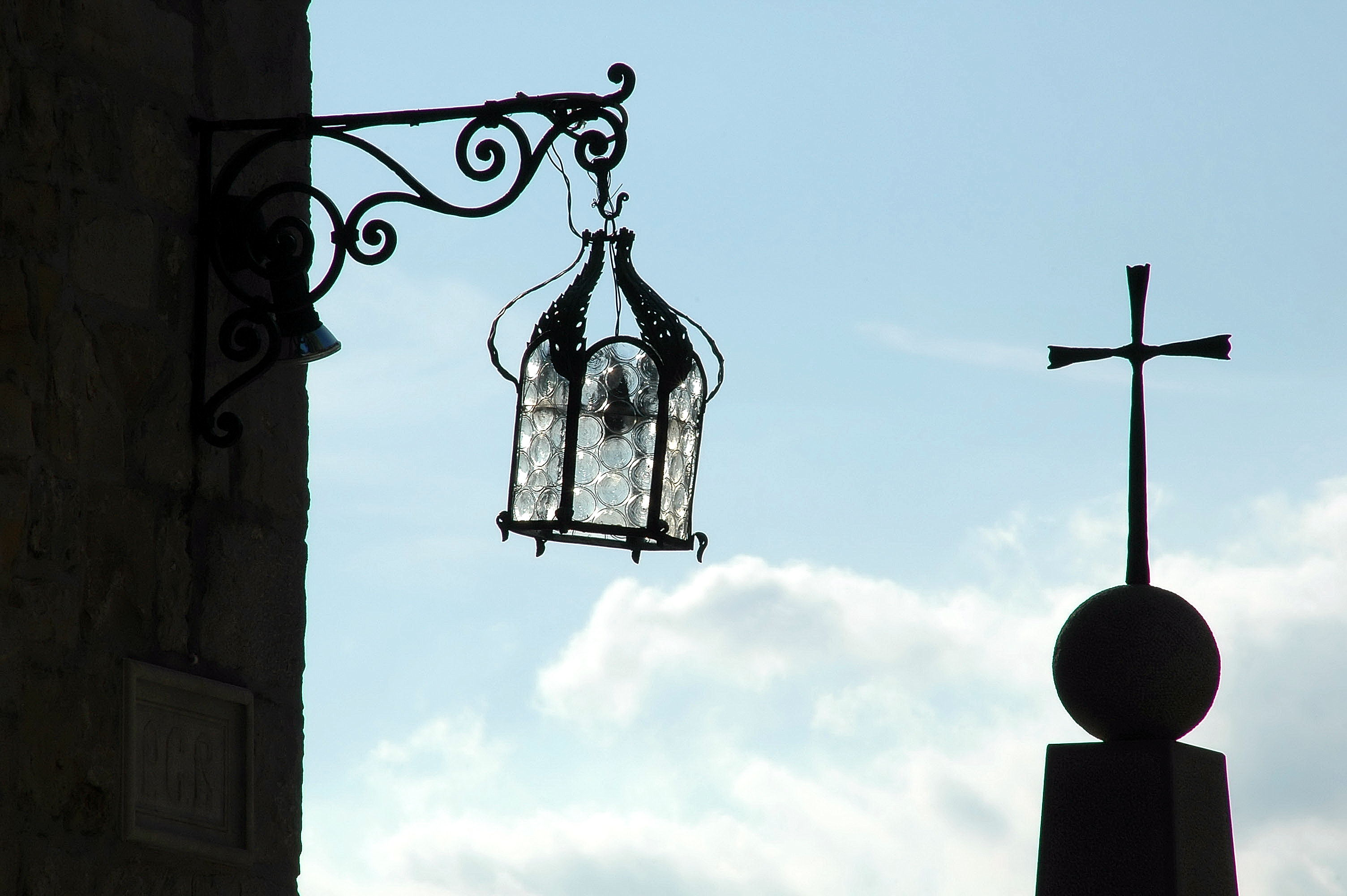 Detail view at castle mountain Castelmonte, Prepotto, provincia di Udine, Friuli-Venezia Giulia, Italy